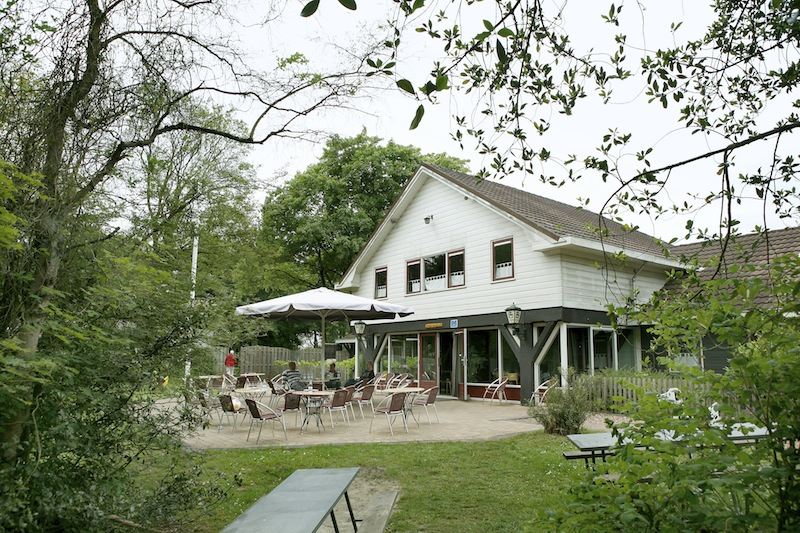 Groepsaccommodatie de Zwerfsteen 2011 Beneluxhuis groepsverblijf